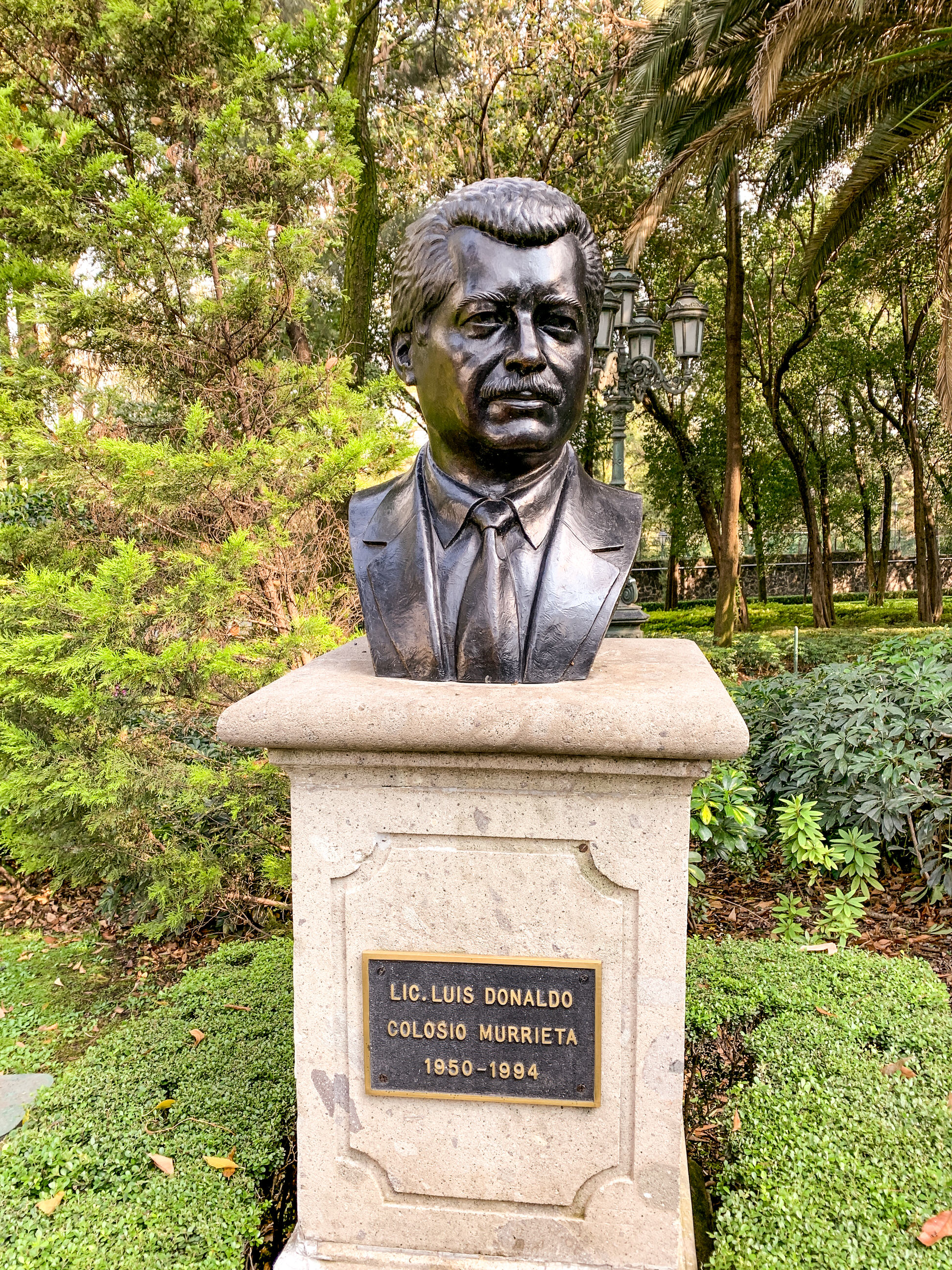 Luis Donaldo Colosio Los Pinos Mexico 2018